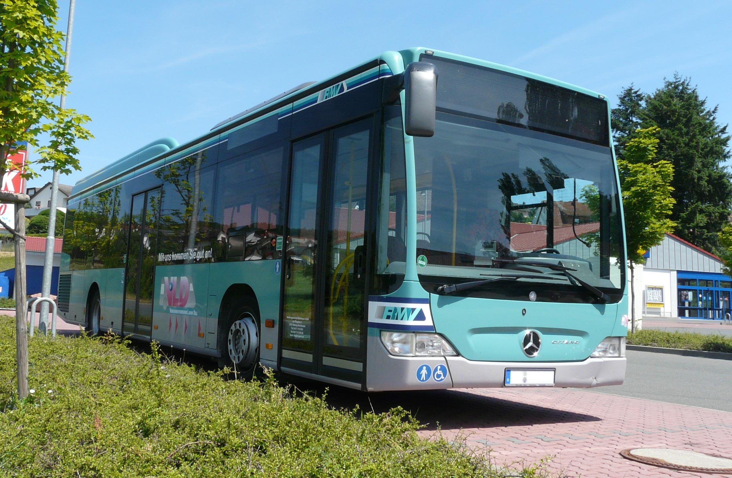 Ein Mercedes-Benz Citaro der Verkehrsgesellschaft Mittelhessen im Design des Verkehrsverbundes Lahn Dill